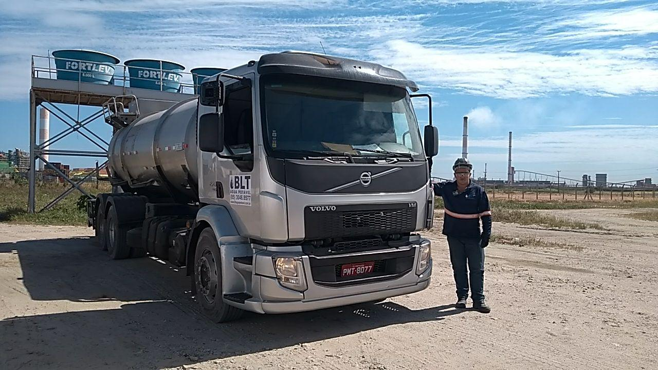 Canteiro de obras - Abastecimento de água. Região Metropolitana de Fortaleza